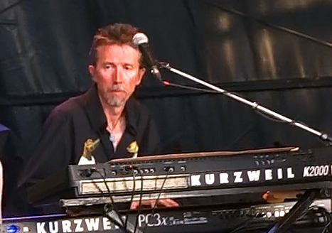 Jean-Claude Normant, musicien et compositeur, accompagnant Julien Grignon en juillet 2010 à Bénodet.